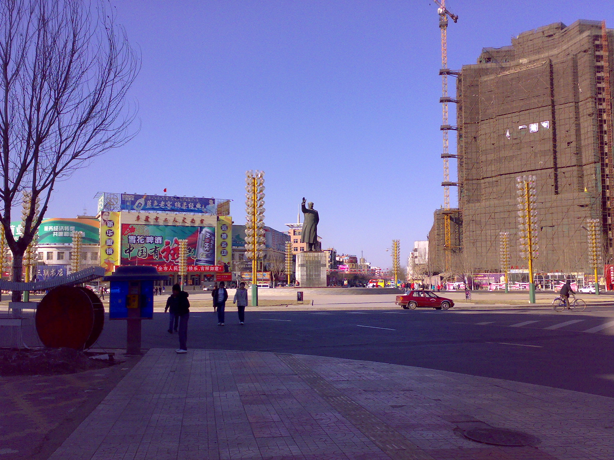 解放广场 Jie Fang square